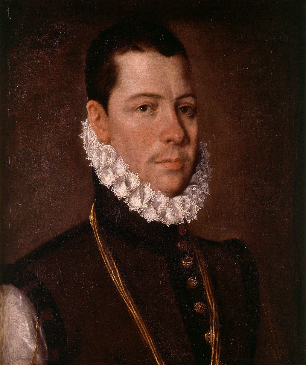 Retrato de Fernando de Gurrea y Aragón (1546-1592), duque de Villahermosa.